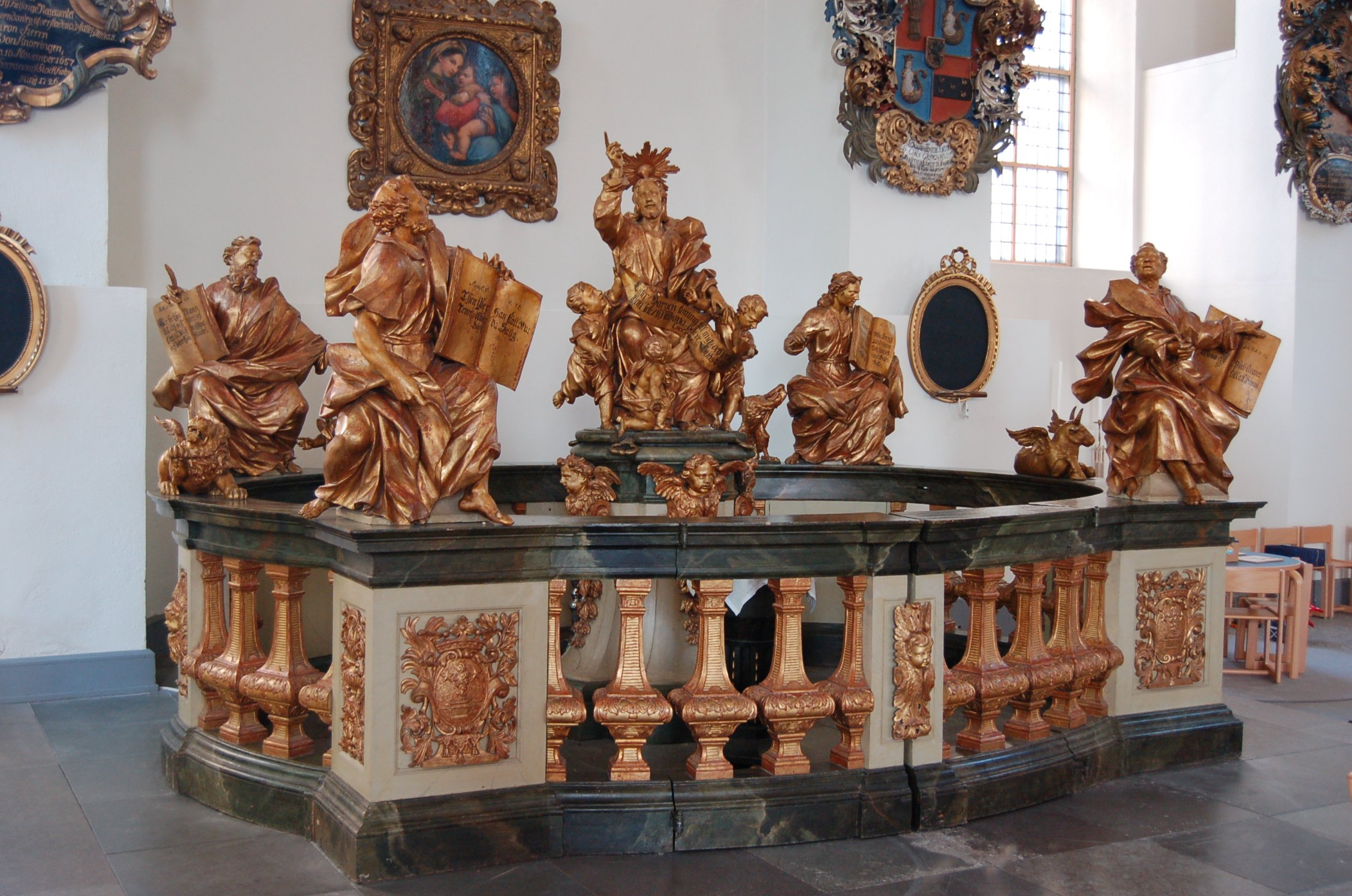 Kungsholms kyrka. Skulpturgruppen i dopkapellet i norra korsarmen. Det vackra skranket i dopkapellet i Kungsholms kyrka i Stockholm. Kyrkans förnämsta inventarium är dopkapellet i norra korsarmen, utfört av bildhuggarmästaren och kungsholmsbon Caspar Schröder och skänkt till kyrkan 1707 av fru Elsa Guthermuth. Kapellet har ett skulpterat skrank. På dopfuntens lock sitter Kristus, omgiven av barn. I skrankens fyra hörn finns de fyra evangelisterna och deras symbolfigurer: Matteus (ängeln), Markus (lejonet), Lukas (oxen) och Johannes (örnen).